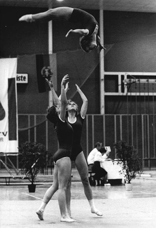 Antje Mahlich, Monika Müller, Simone Nikolaizig ADN-ZB Kluge 16.10.82 Leipzig: DDR-Meisterschaften in der Sportakrobatik -Die Gruppe von Dynamo Halle-Neustadt mit Antje Mahlich, Monika Müller und Simone Nikolaizig wurde mit 47,1 Punkten Sieger im Wettbewerb der Damen.